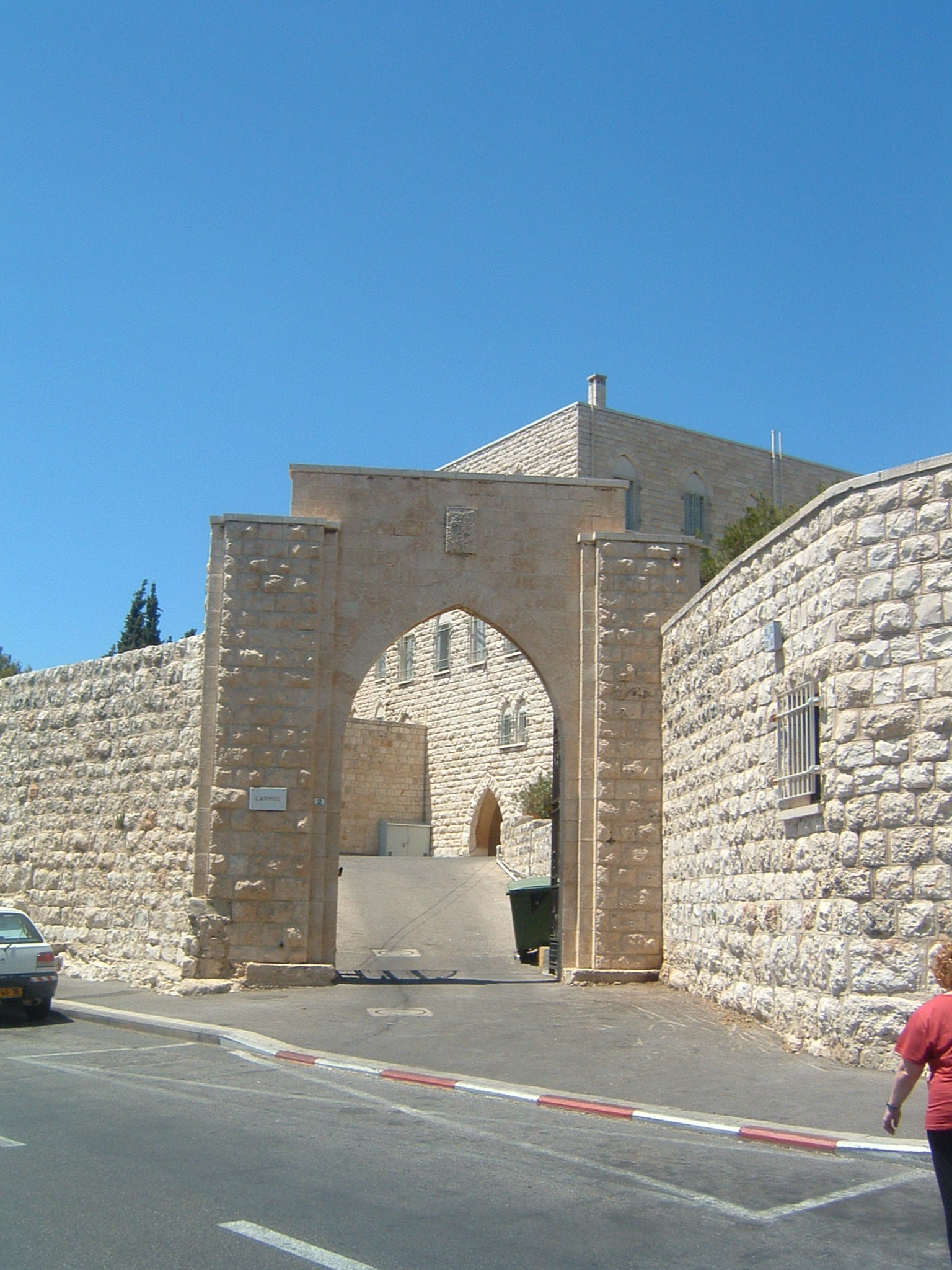 Foto scattata da me il 12 giugno 2008 Entrata del monastero carmelitano ad Haifa